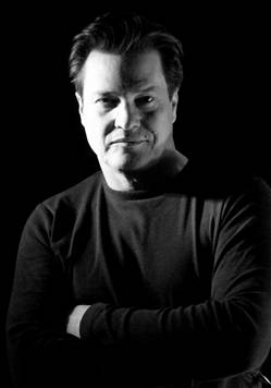 Fotografía del actor Pedro Mari Sánchez